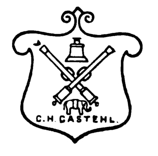 Gießerwappen des Wander-Glockengießer Castell.